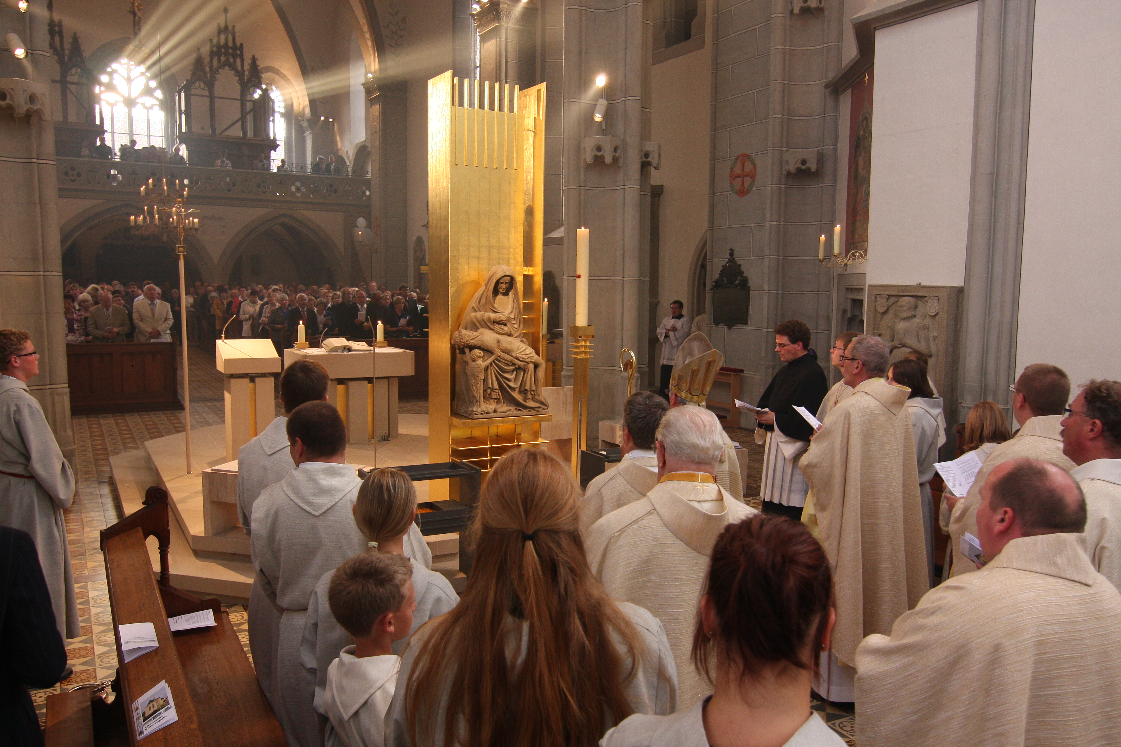 Mariensäule mit schmerzvoller Pietà bei der Altarweihe der Ritterkapelle Haßfurt mit Bischof Friedhelm Hofmann im Jahr 2010